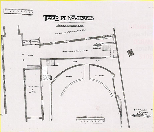 Plano de la reforma de la planta baja del Teatro Novedades de Madrid, del arquitecto José Espelius.